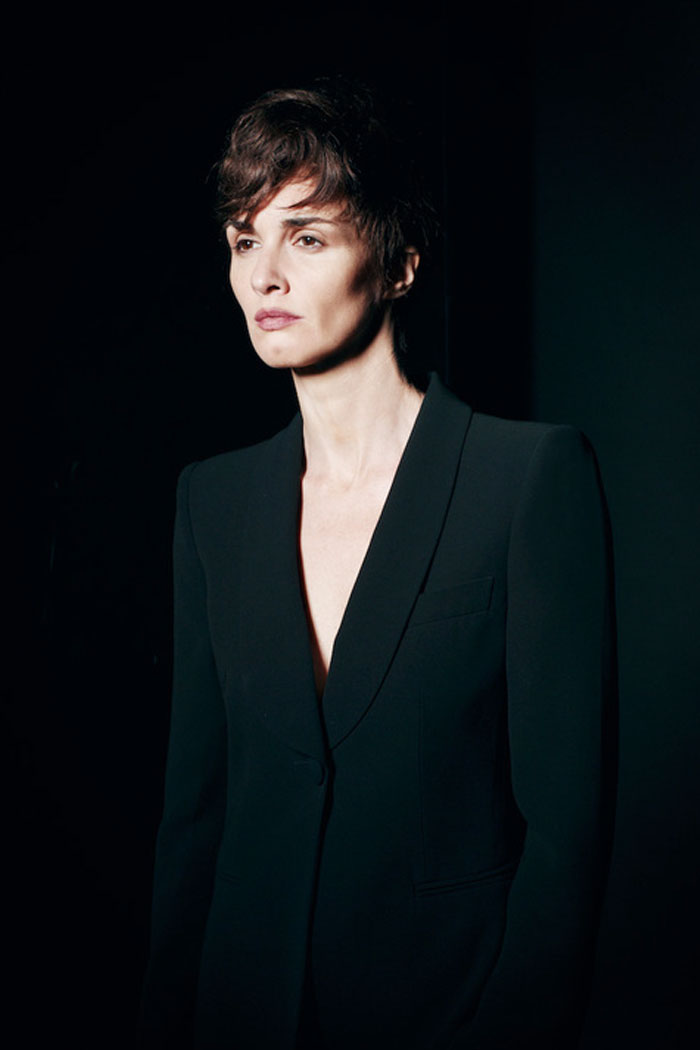 Paz Vega, actriz quien interpreta a Luisa en La Hermandad